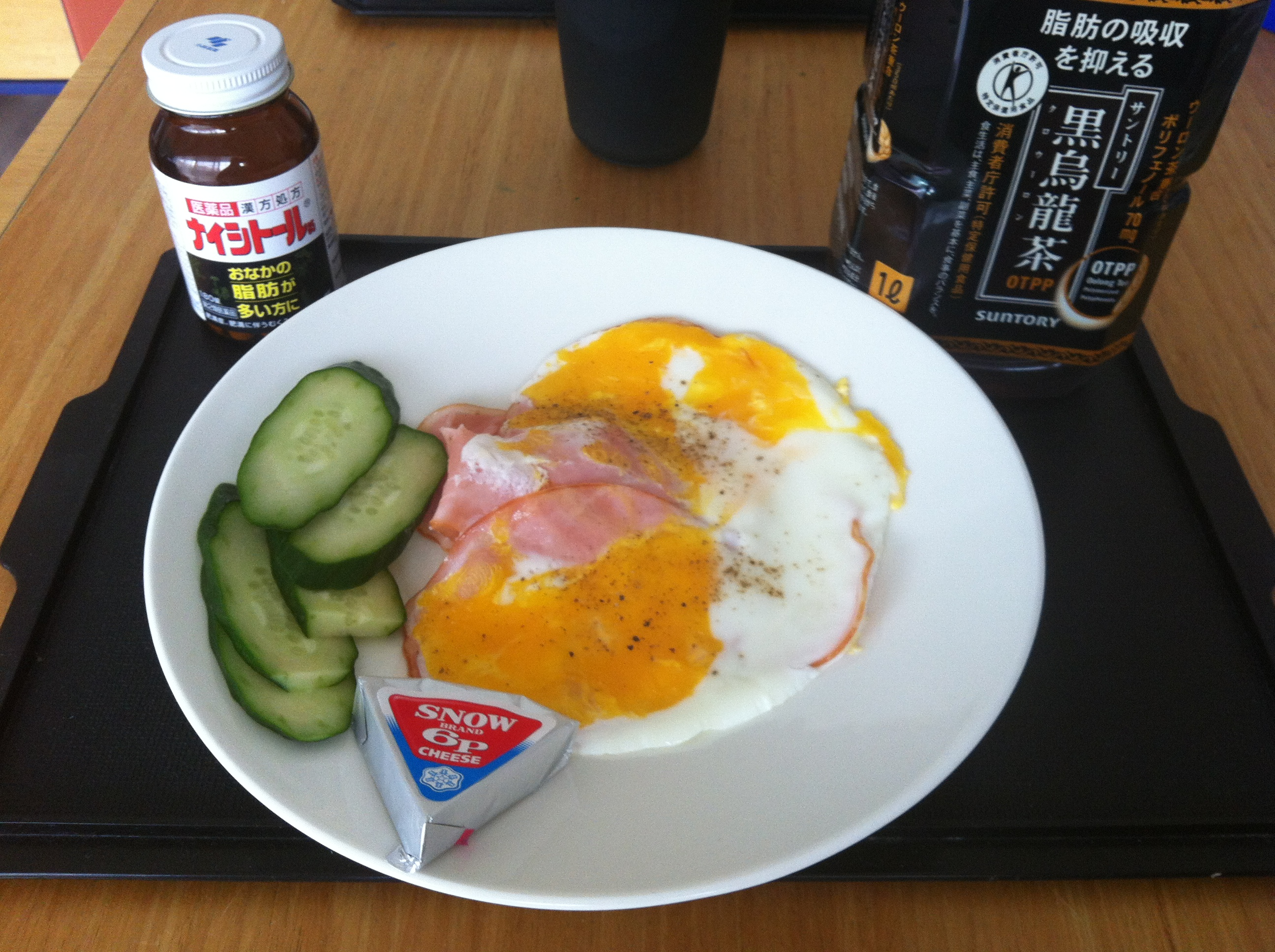 朝 手抜き、、、